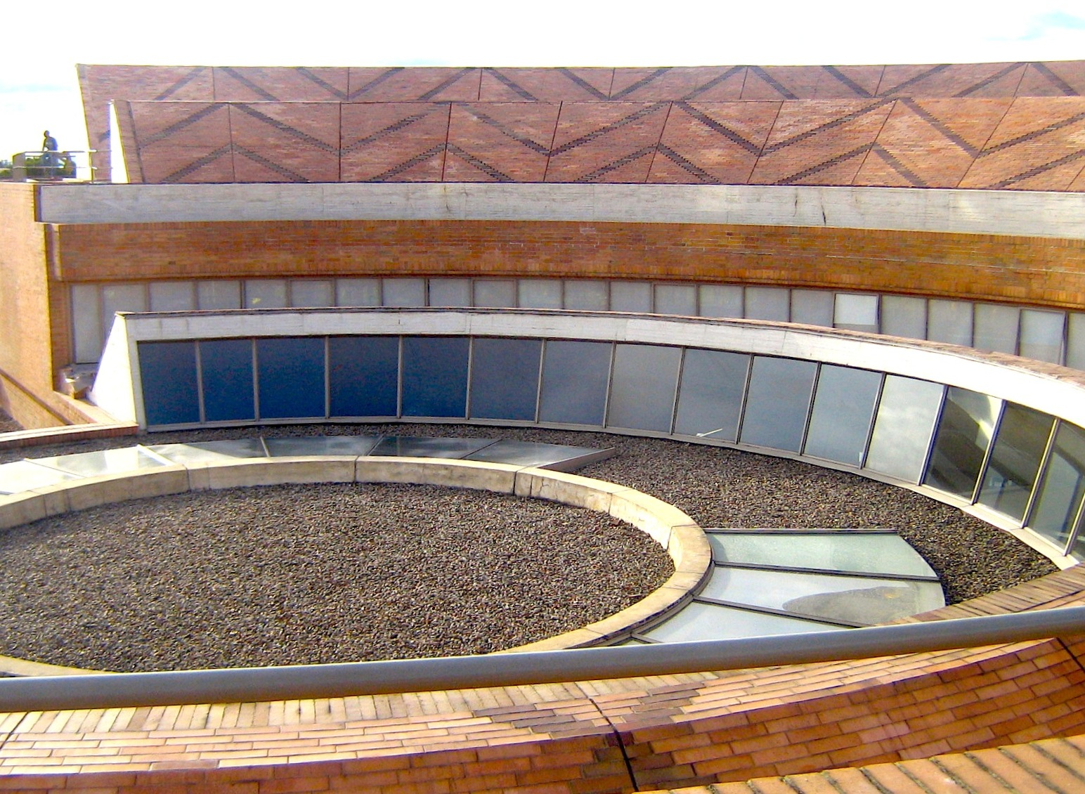 Biblioteca Virgilio Barco Bogotá D.C.